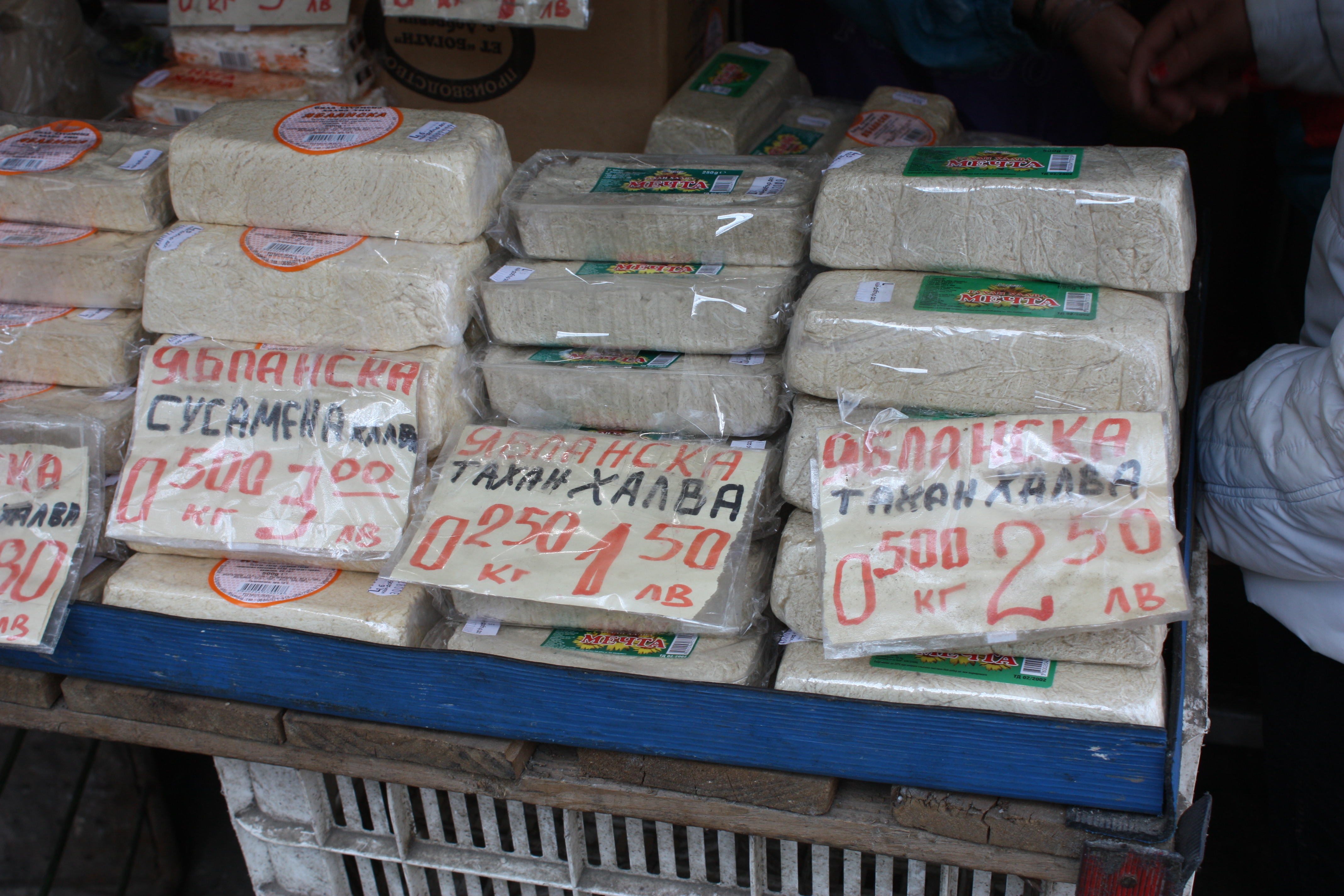 Tachan Halva Тахан халва, in Sofia,Bulgaria